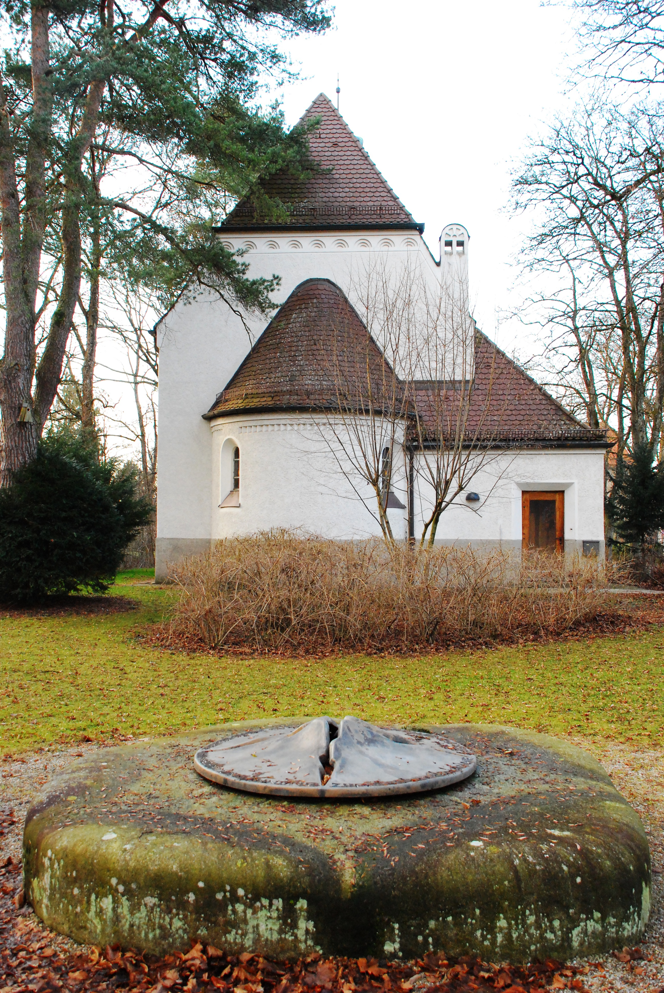 Mahnmal von Josef Golwitzer zum Gedenken an die Opfer der Euthanasie während der NS-Zeit im Bezirkskrankenhaus Haar (heute Isar-Amper-Klinikum München-Ost), eingeweiht am 18. Januar 1990 als 50. Jahrestag des ersten Abtransports von Kranken. Im Hintergrund die 1905 erbaute, evangelische Jesuskirche auf dem Gelände des Klinikums in Haar, Landkreis München, Regierungsbezirk Oberbayern, Bayern.